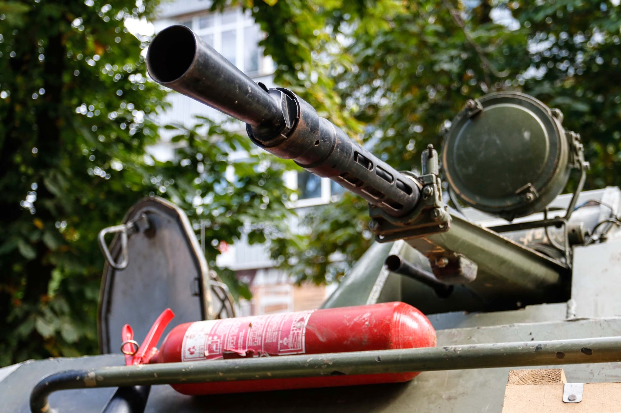 Славянск